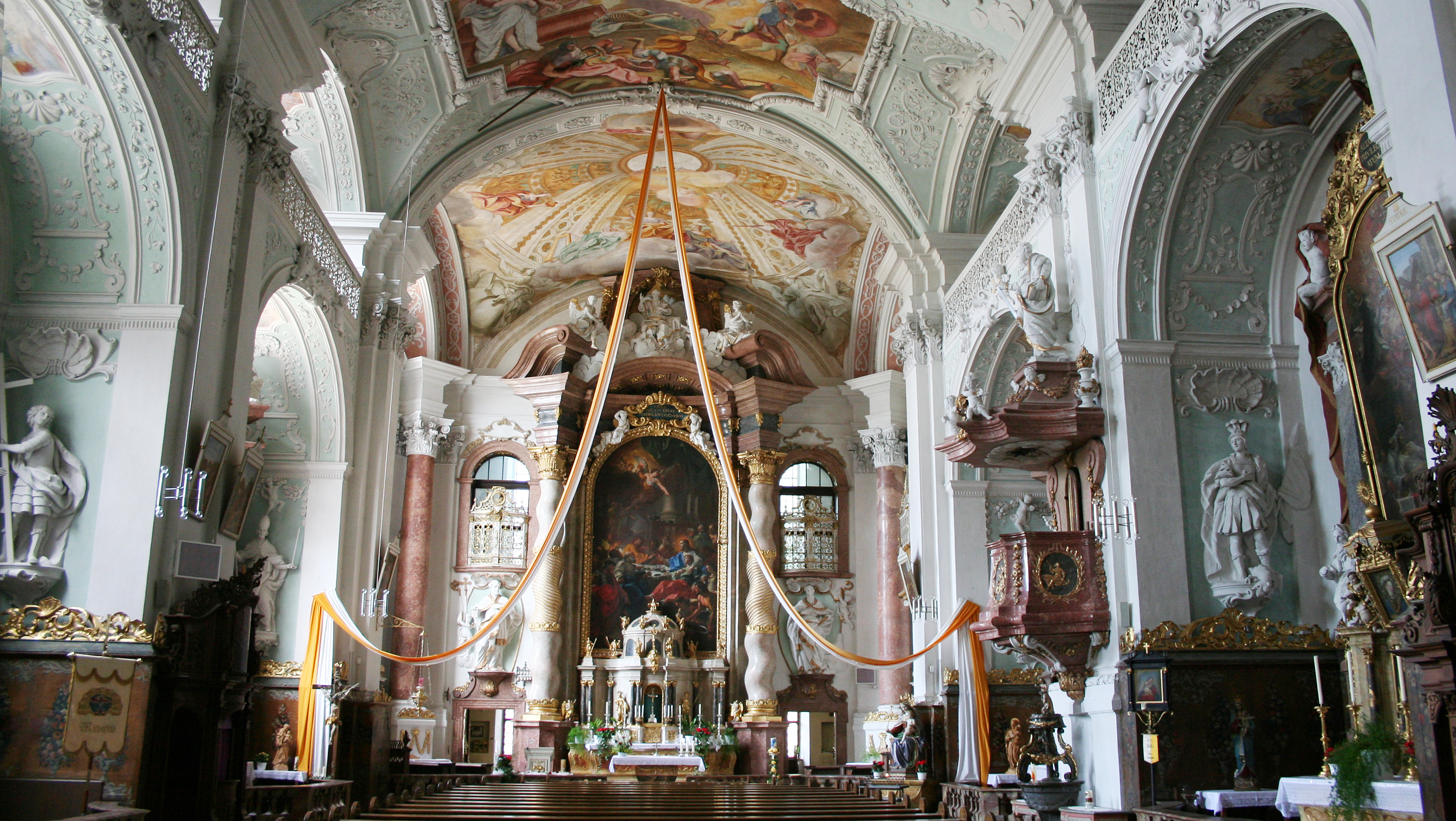 Innenraum der Klosterkirche Michelfeld in der Oberpfalz